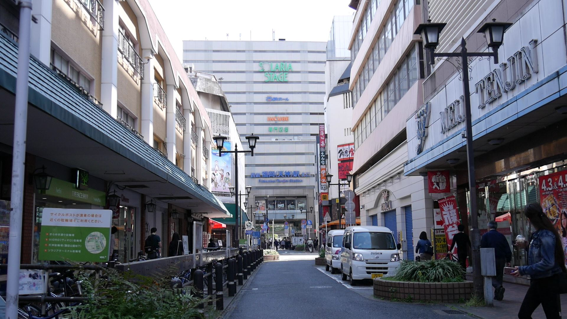 西鉄福岡駅から続く天神サザン通りの様子